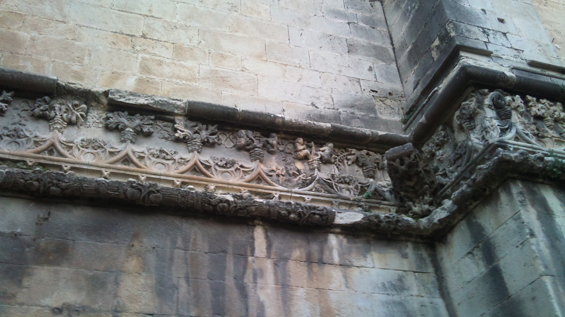 Vista de una sección del friso gótico que discurre por la fachada este de la Catedral de Jaén.